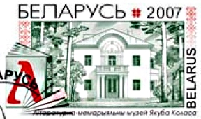 Литературный музей Якуба Коласа. Художник - Микола Рыжий.